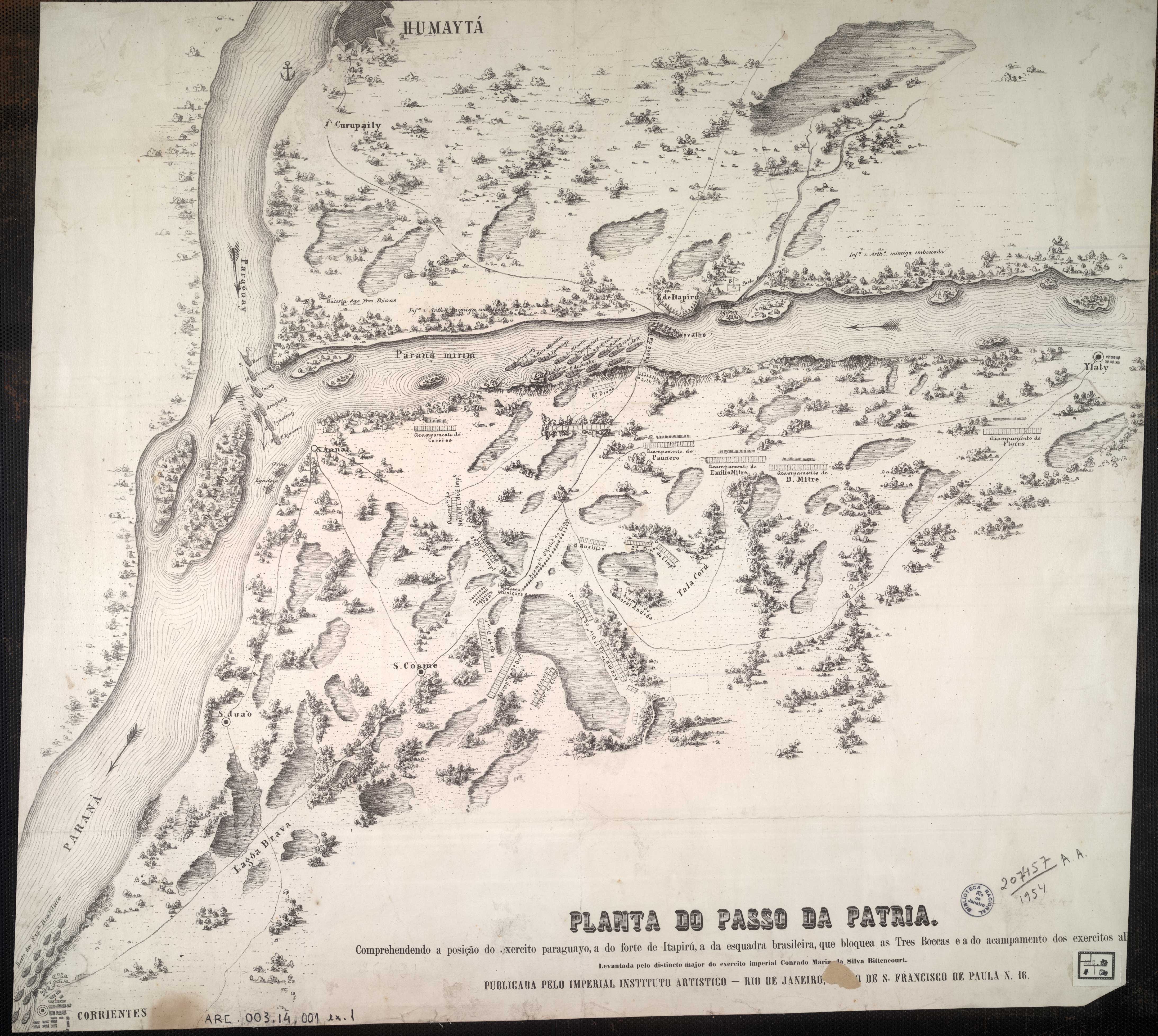 Mostra o exército aliado acampado na Argentina, iniciando a travessia no Rio Paraná e invandindo o Rio Paraguai, com o objetivo de atingir a Fortaleza de Humaitá, localidada nas margens do Paraguai.